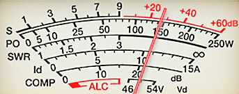 S-Meter Kenwood TS-990